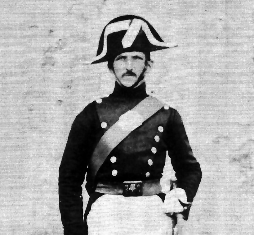 Positivo sobre cartulina - reportaje fotográfico sobre la construcción del ferrocarril de Santander a Alar del Rey (Palencia)